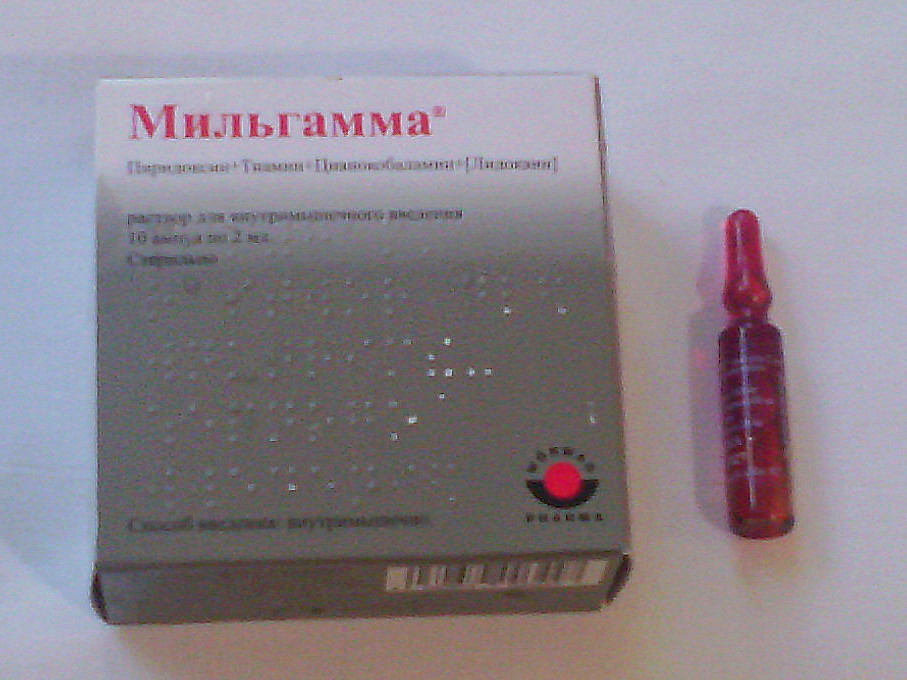 Мильгамма — комбинированное лекарственное средство. Содержит витамины B1, B6 и B12, а также лидокаин. Обладает анальгезирующим действием, улучшает кровоснабжение, стимулирует регенерацию нервной ткани, улучшает проведение нервного импульса.